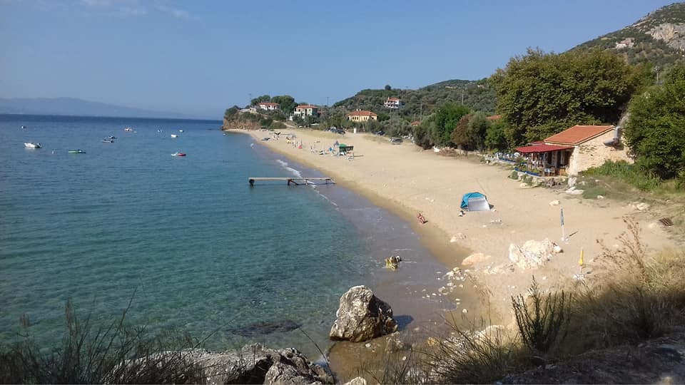 Παραλία Μικρό Πηλίου